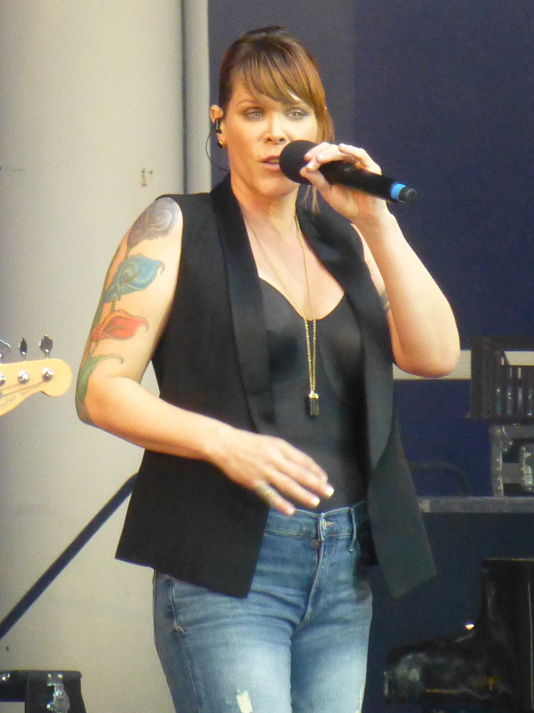 Beth Hart i Tivoli Friheden Aarhus 24 juni 2016